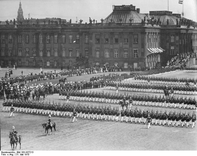 Potsdam, Frühjahrsparade vor Stadtschloss ADN-ZB/Archiv Die Armee im kaiserlichen Deutschland Frühjahrsparade vor dem Kronprinzen Wilhelm am 31.5.1910 in Potsdam. 8159-10